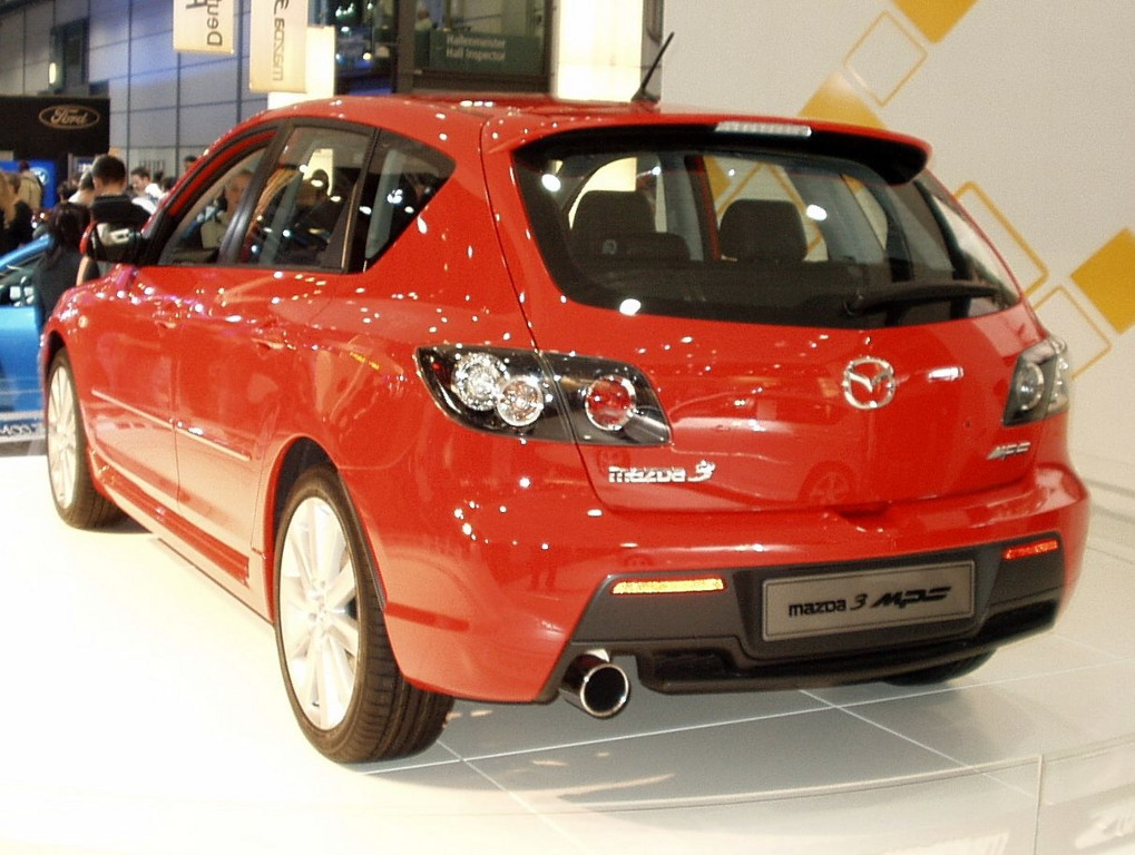 Mazda 3 MPS